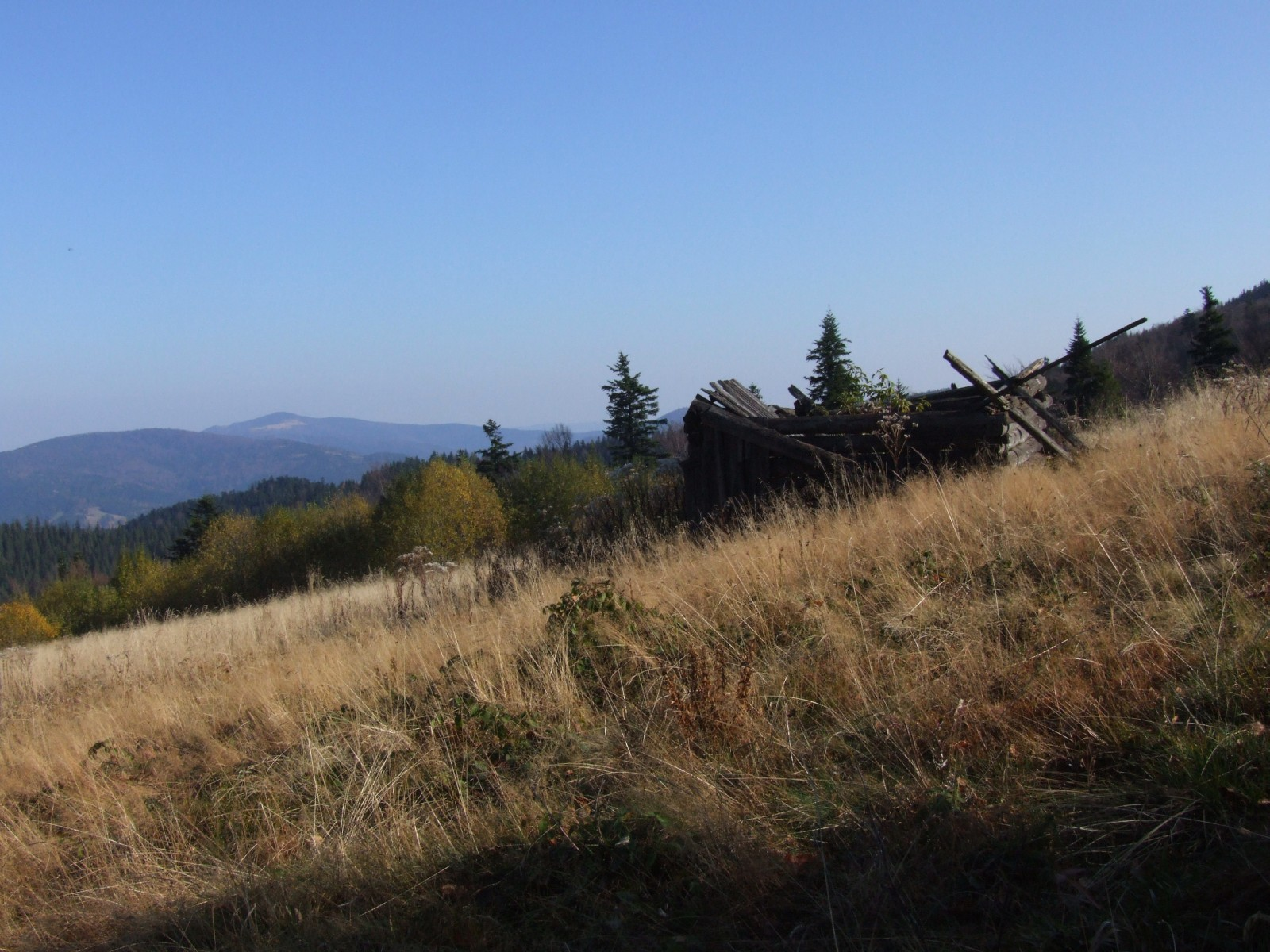 Polana Kopa w Gorcach. W głębi Mogielica